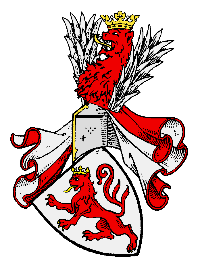 Stammwappen der Herren von Oberstein, einem südwestdeutschen Uradelsgeschlecht mit Stammburg Bosselstein, im gotischen Wappenstil.